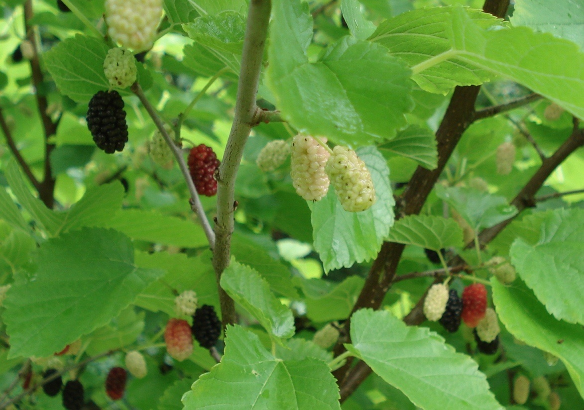 Morus_nigra_-_Fruits_in_different_stages_of_ripeness